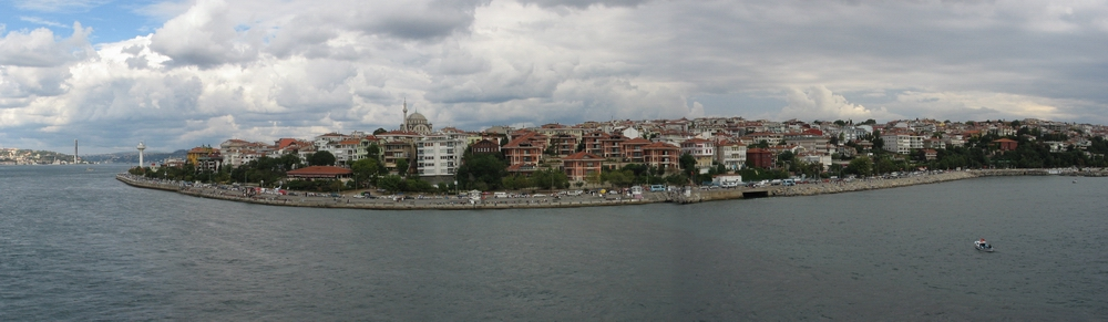 Salacak, a neighbourhood of Üsküdar district in Istanbul, Turkey. (Salacak Panoraması)